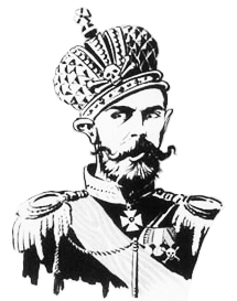 Изображение Николая II на агитационном плакате РСДРПб во время революции.